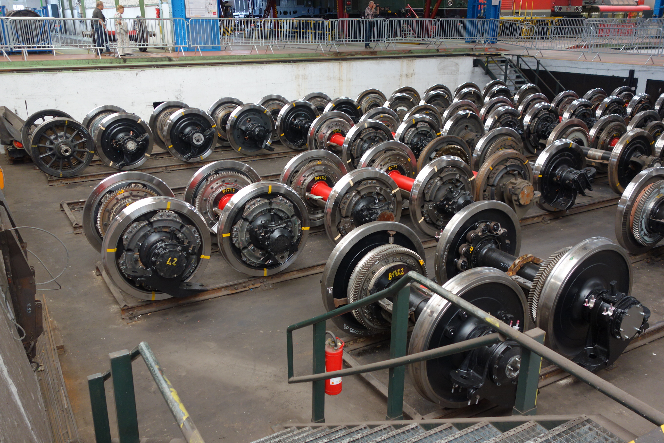 DB Fahrzeuginstandhaltung Werk Dessau, Tag der offenen Tür, Werkshalle mit Treibradsätzen